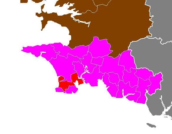 Maps of arrondissements and cantons of France: Arrondissement de Quimper - Canton de Pont-l Abbé.PNG (Département du Finistère , Arrondissement de Quimper)